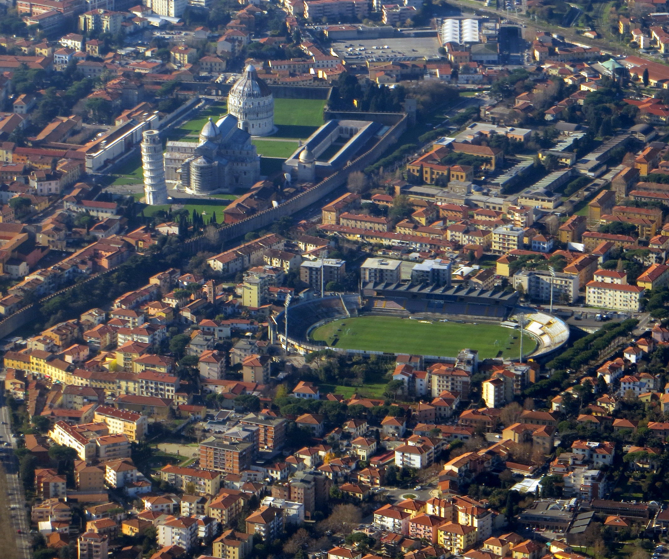 Veduta di Pisa dall'aereo